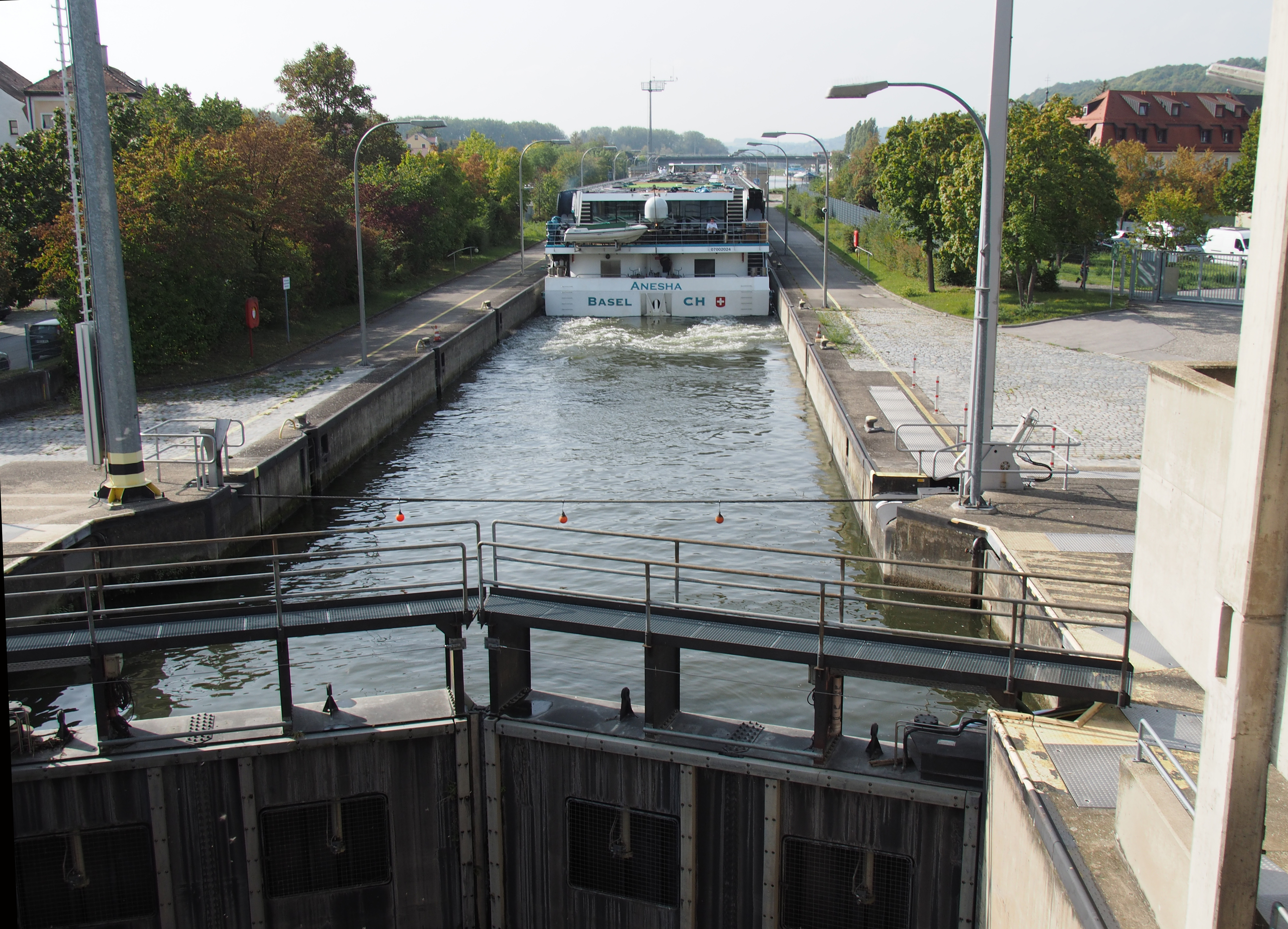 Schleuse am Europakanal in Regensburg (Bayern, Oberpfalz)